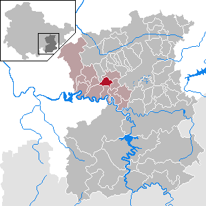 Moxa in Thuringia - Saale-Orla-Kreis